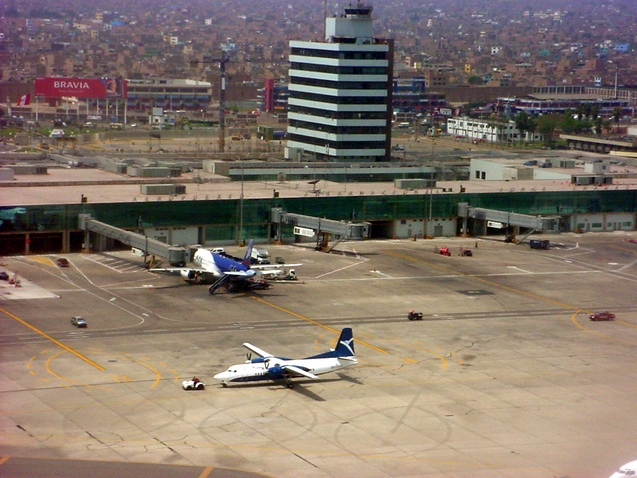 Aeropuerto Jorge Chavez, Lima Perú. Septiembre 2006